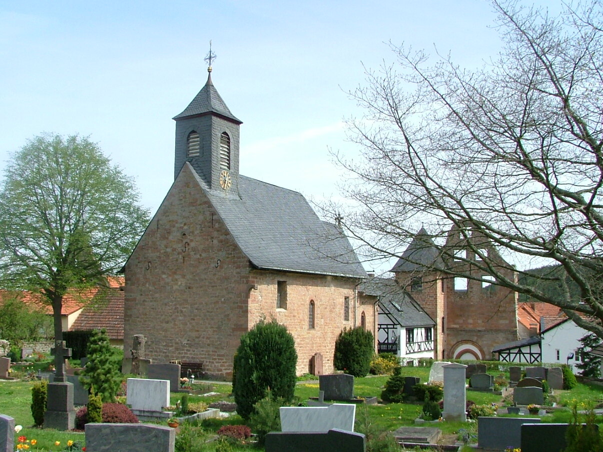 Die romanische Kirche St. Jacob steht im Ortskern von Höningen. Der umgebende Friedhof diente im Mittelalter den benachbarten Gemeinden als Begräbnisstätte. Im Hintergrund: Giebel vom Konventsgebäude (links) und der Westgiebel der zerfallenen Klosterkirche (rechts).